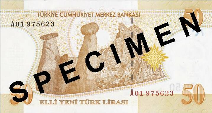 50 YTL arka